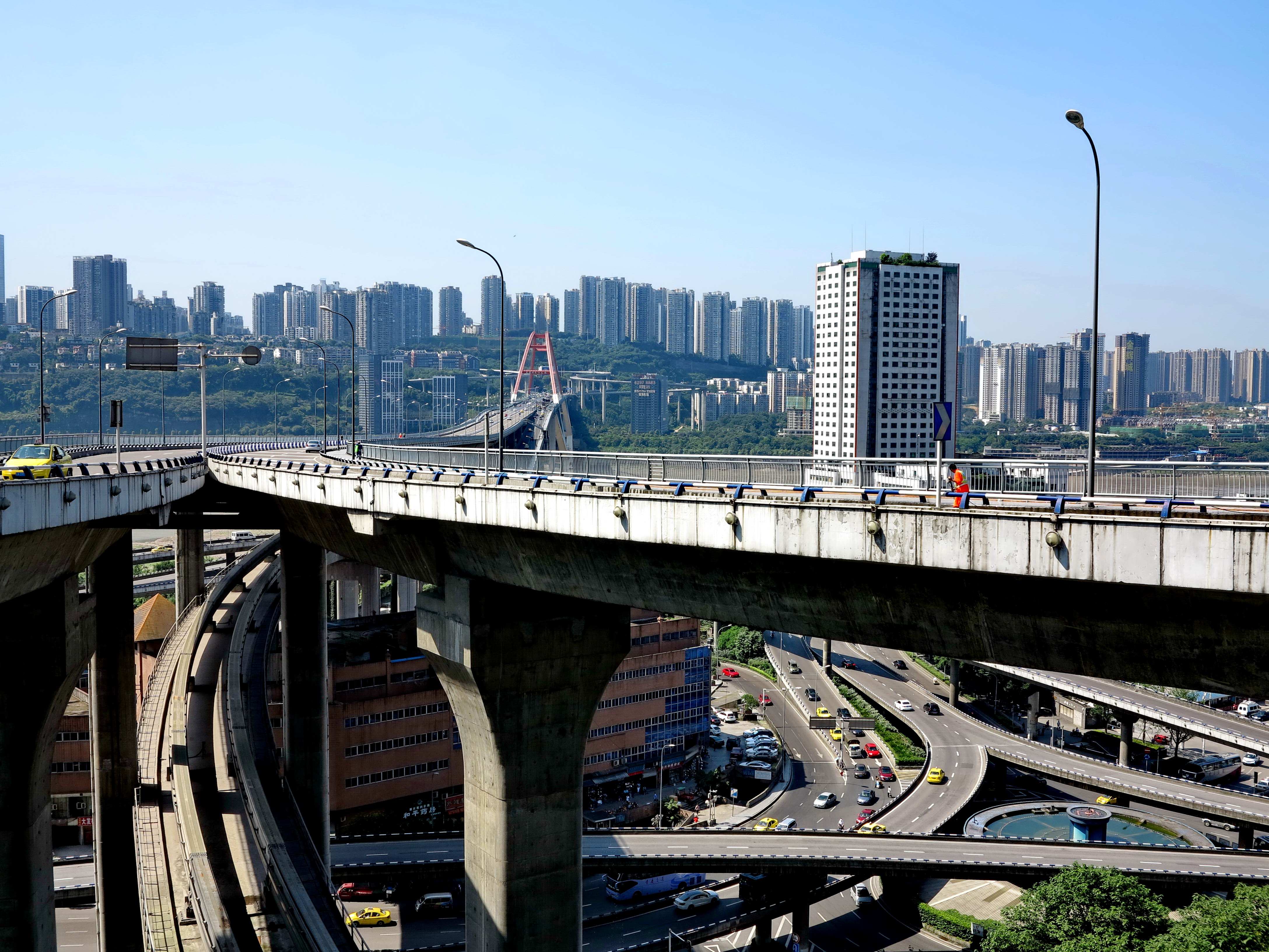 重庆的蓝天- 菜园坝立体交叉大桥(两路口)